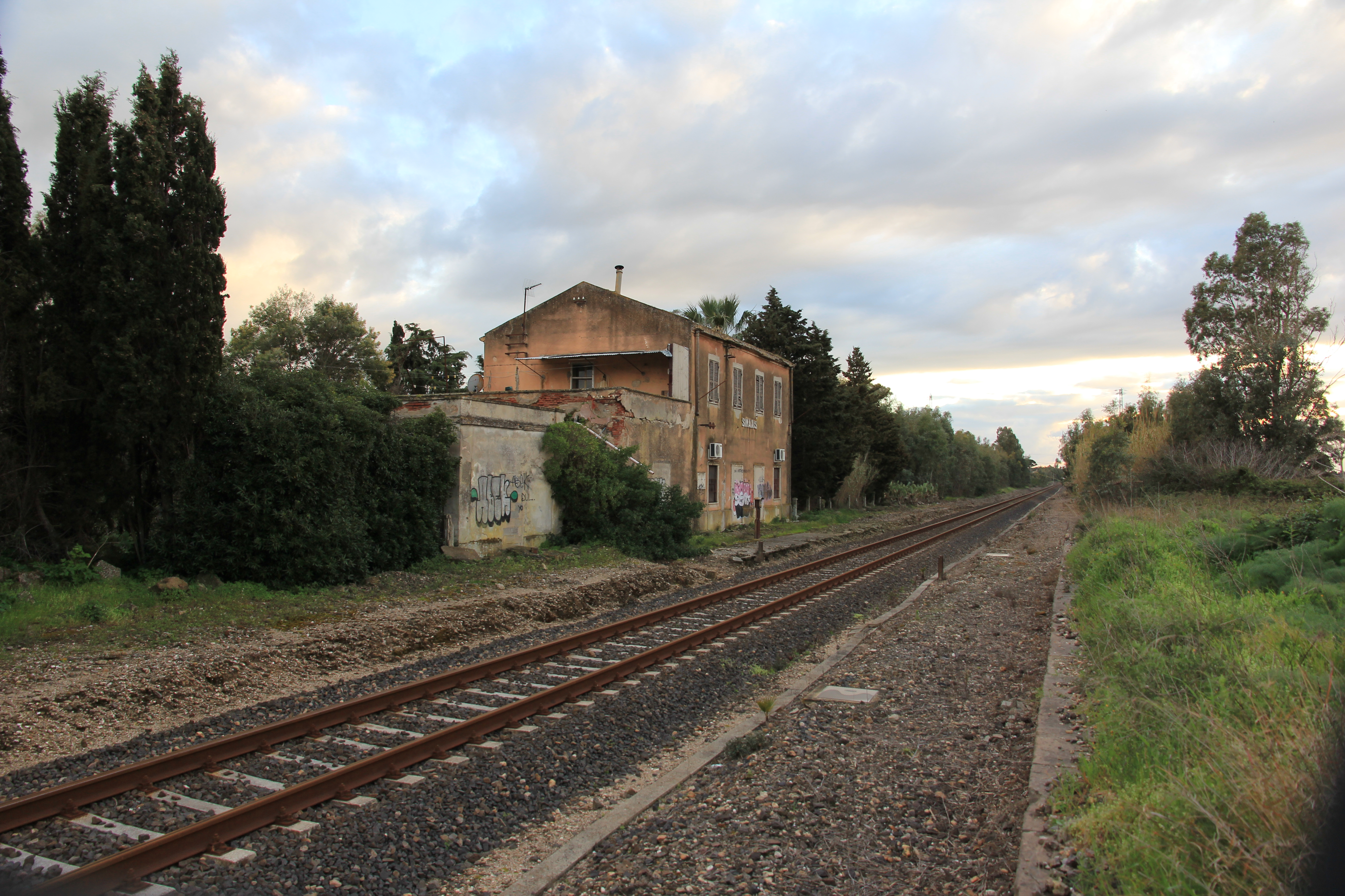 Ex stazione ferroviaria di Simaxis